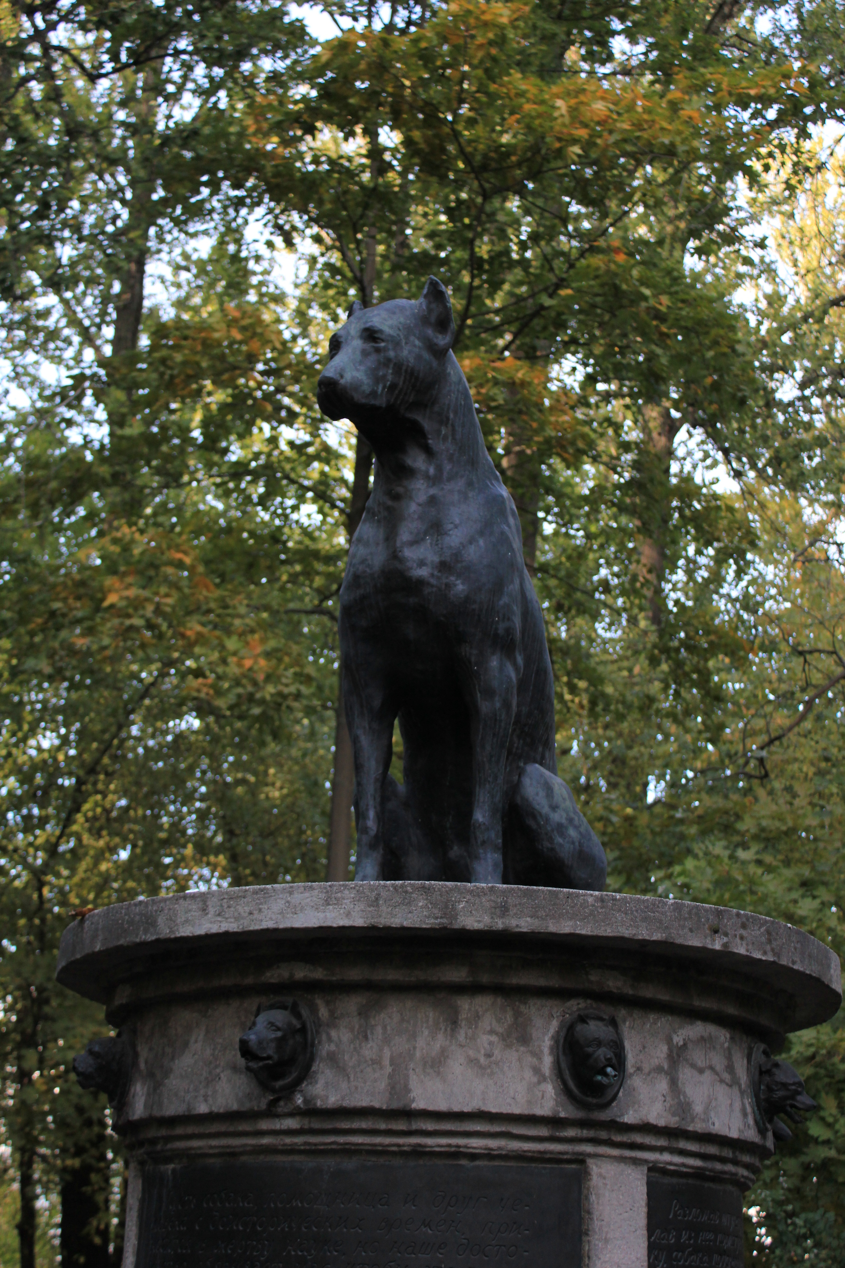 Памятник собаке (Санкт-Петербург, Академика Павлова улица, 9, 12)